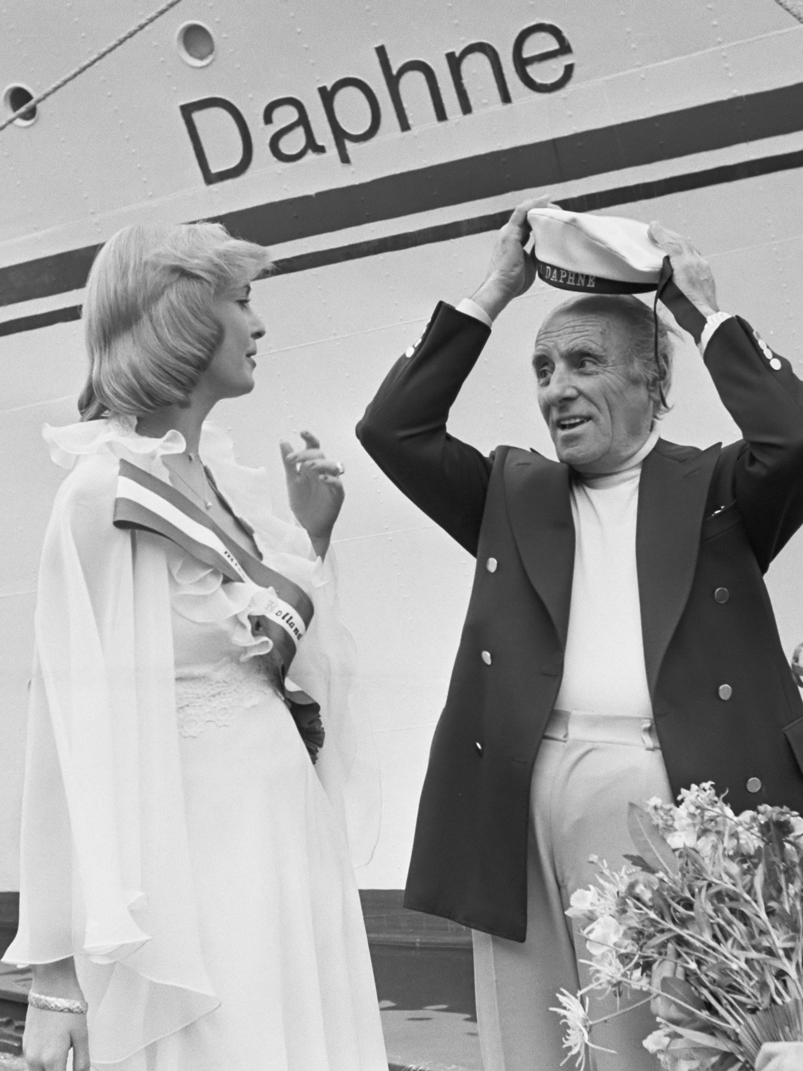 Grieks Carras-cruiseschip "Daphne" in Amsterdam, reder Carras en Miss Holland Nanny Nielen. Het meisje met bloemen heet ook Daphne 28 mei 1976